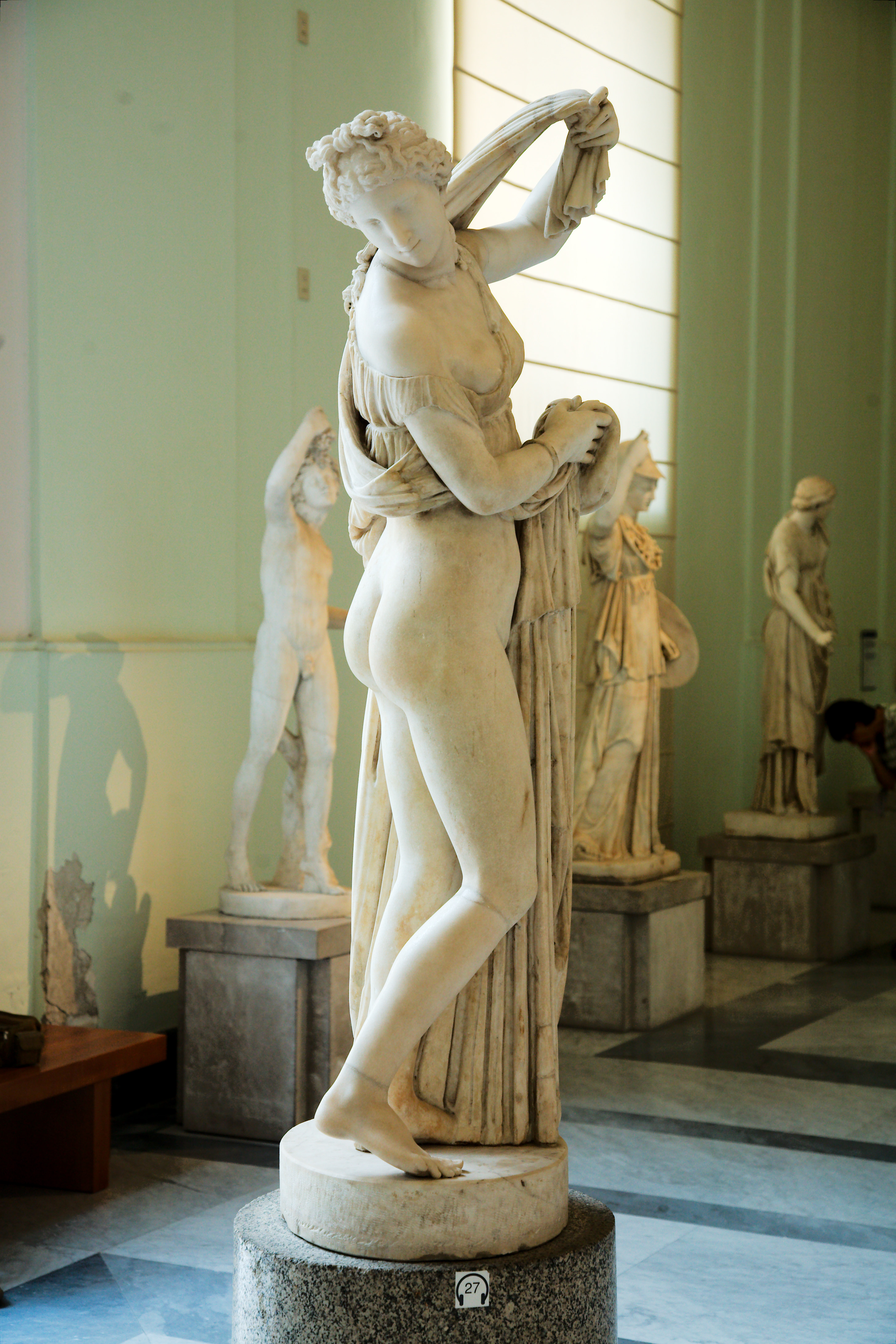 Venus Kallipyge (Naples)